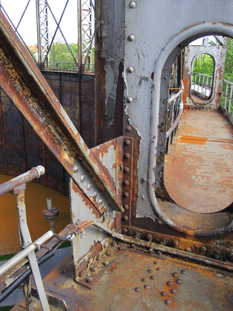 Detail Führungsgerüst des Schöneberger Gasometers (2010)